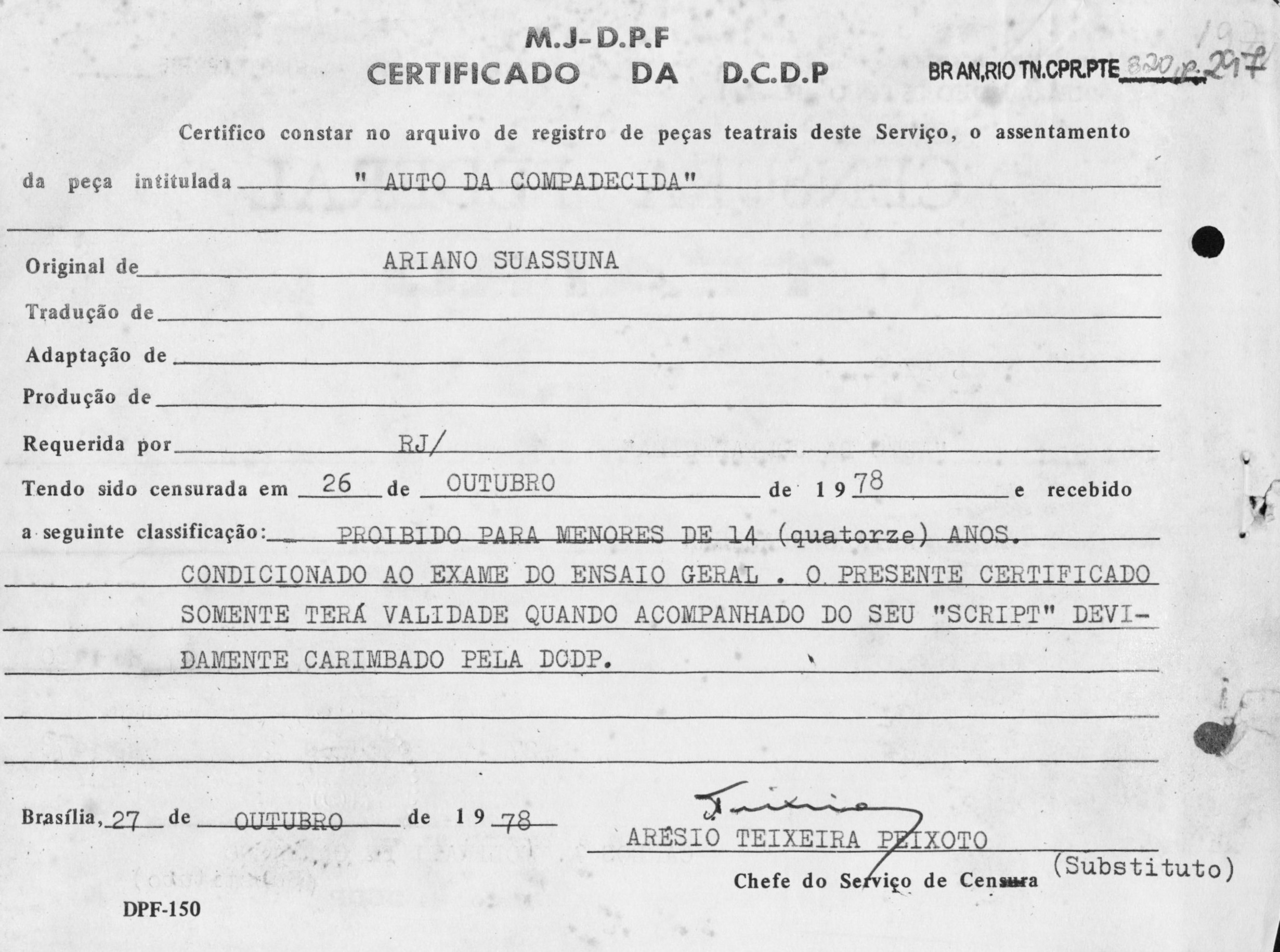 Imagem do Fundo Documental Serviço de Censura de Diversões Públicas (RJ).